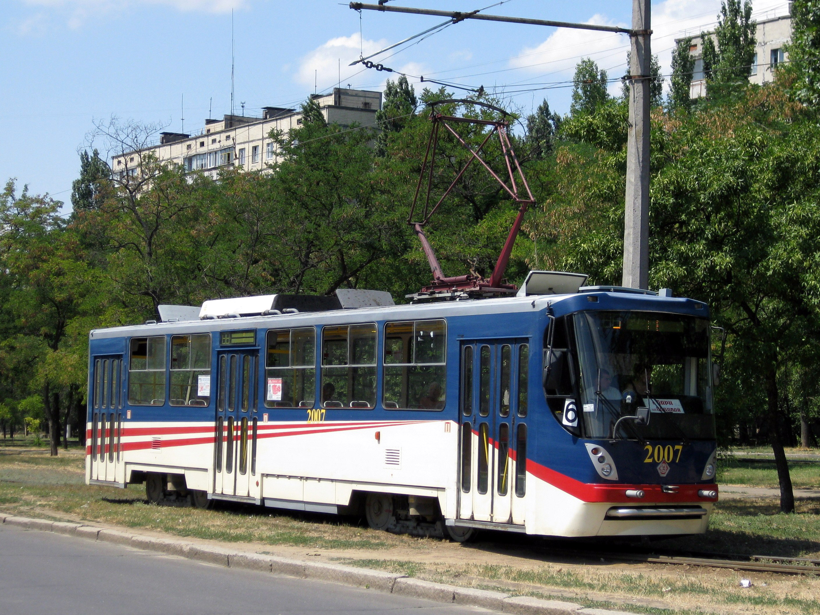 Трамвай К-1 в Николаеве